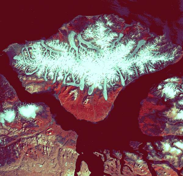 Calotte glaciaire de Bylot, Canada